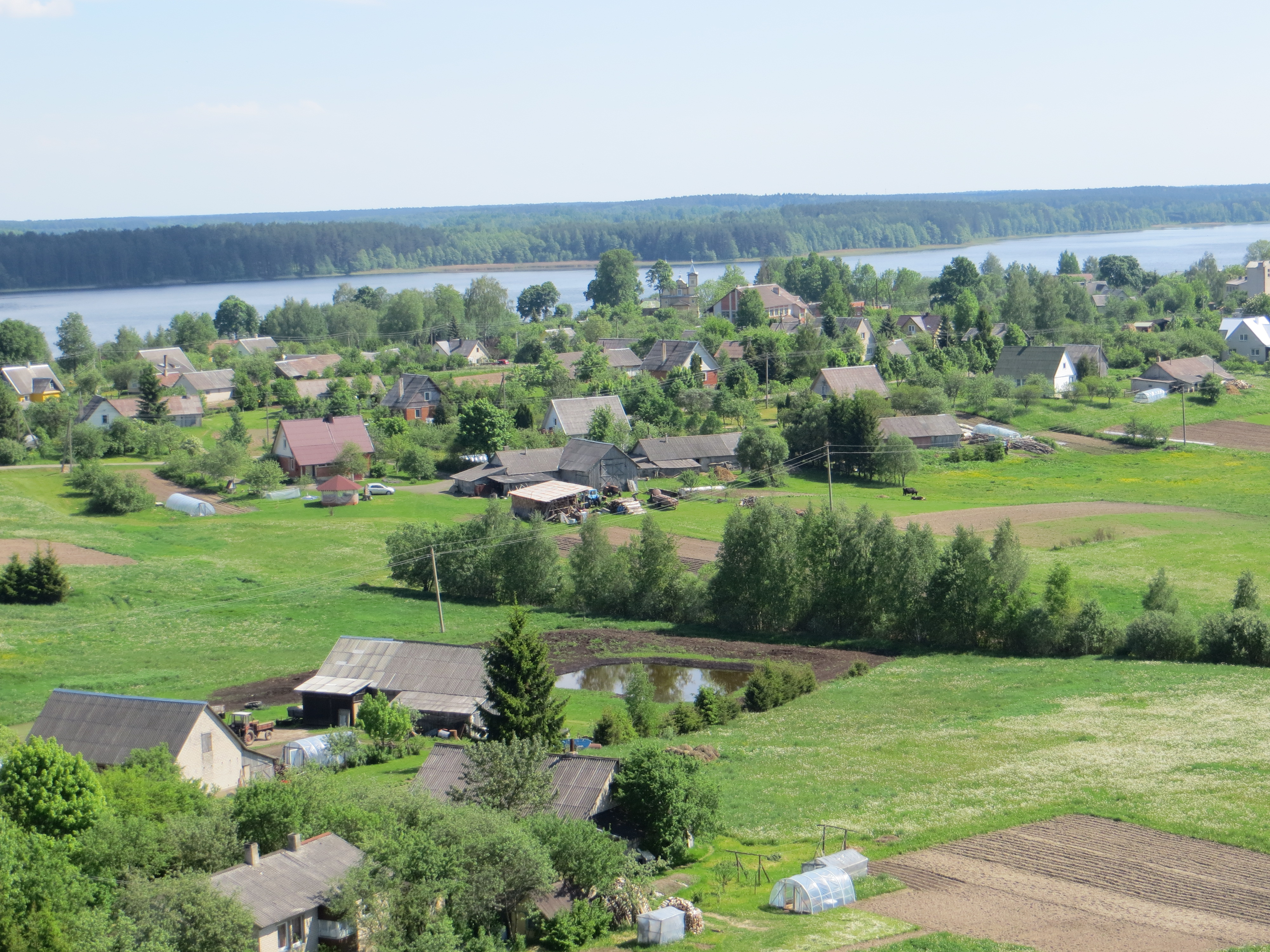 Joniškis, Lithuania